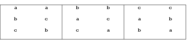 Permutatsioon matemaatikas. Kolmel elemendil a, b ja c on kuus permutatsiooni (Thompson 1994:310)